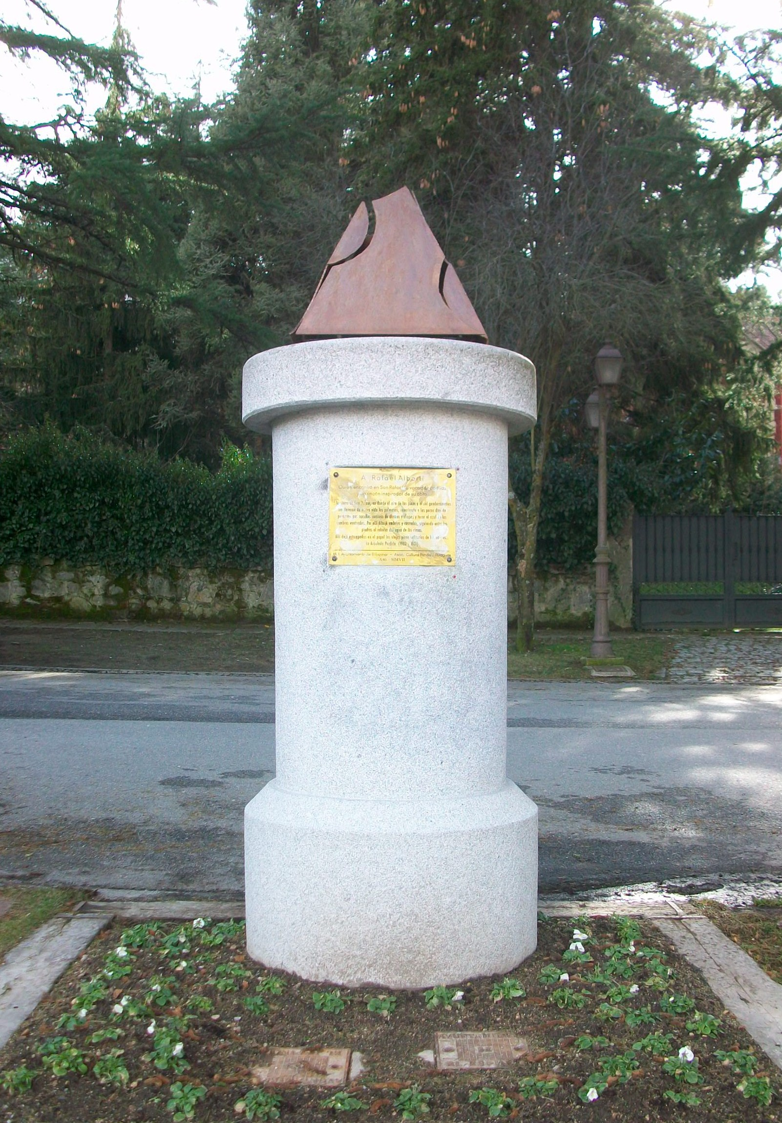 Monumento a Rafael Alberti en la localidad segoviana de San Rafael (España). Fue inaugurado el 17 de marzo de 2007 en la avenida Paseo de Rivera. Tiene la forma de las miras características de San Rafael, es decir, un monolito con la base circular y la cabeza triangular. Posee una placa conmemorativa donde aparecen unas líneas de su obra literaria «La arboleda perdida» donde habla de San Rafael, el lugar donde la escribió y comenzó su carrera literaria.